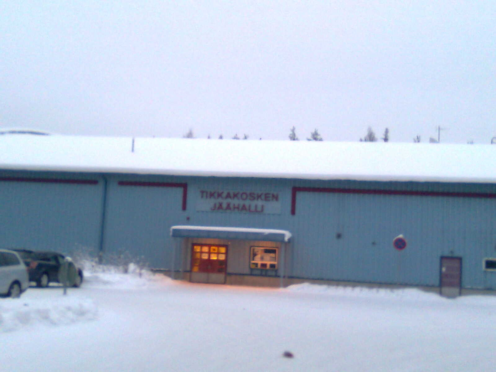 Tikkakosken jäähallin pääsisäänkäynti 19. tammikuuta 2010.